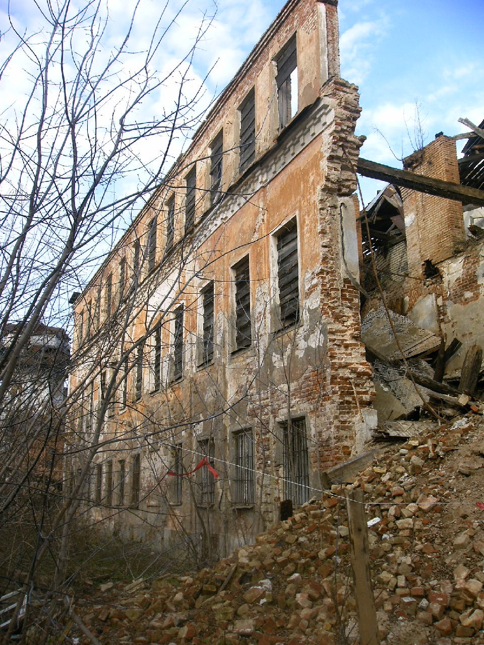 петровское усадебный дом